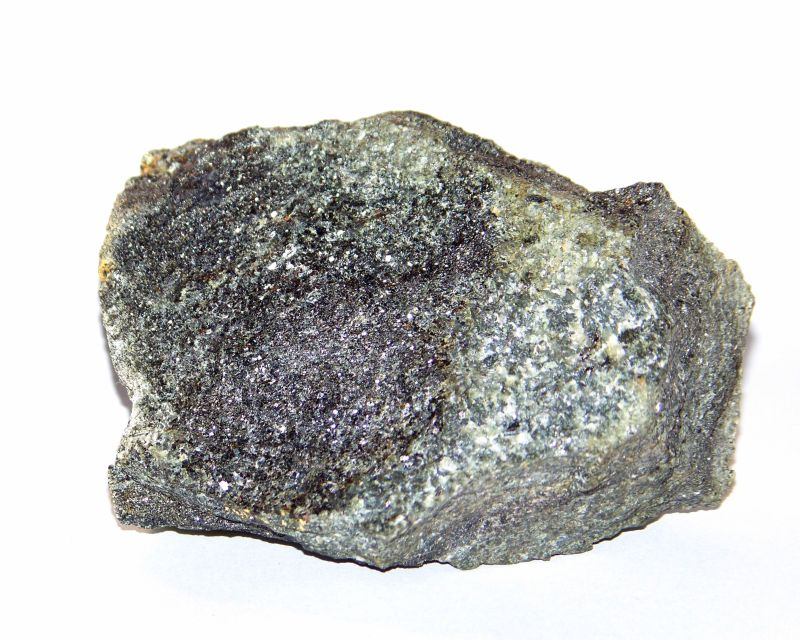 Amfibolit znaleziony jako eratyk w Górach Świętokrzyskich. Dokładnie pod Grzywami Korzeczkowskimi w miejscowości Polichno k. Chęcin.